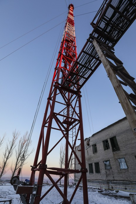 Телевежа на горі Карачун